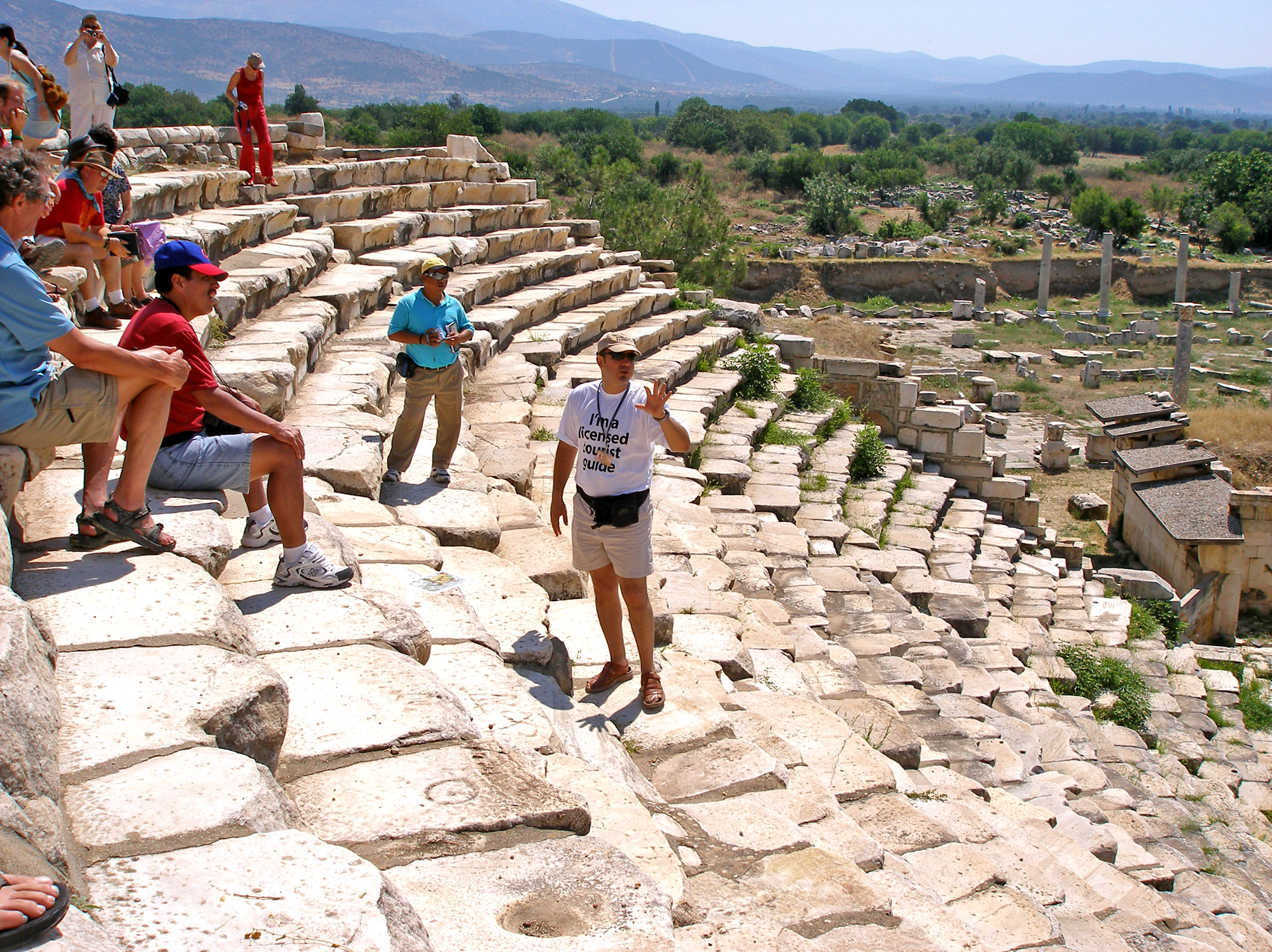 Aphrodisias Tiyatro'yu anlatan Turist Rehberi Şerif Yenen